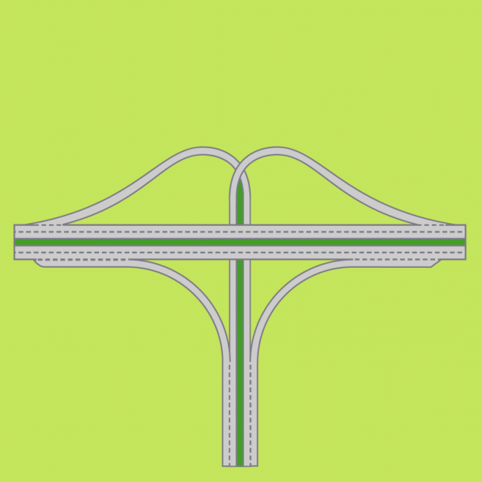 インターチェンジ（Y型：その一）の説明図。